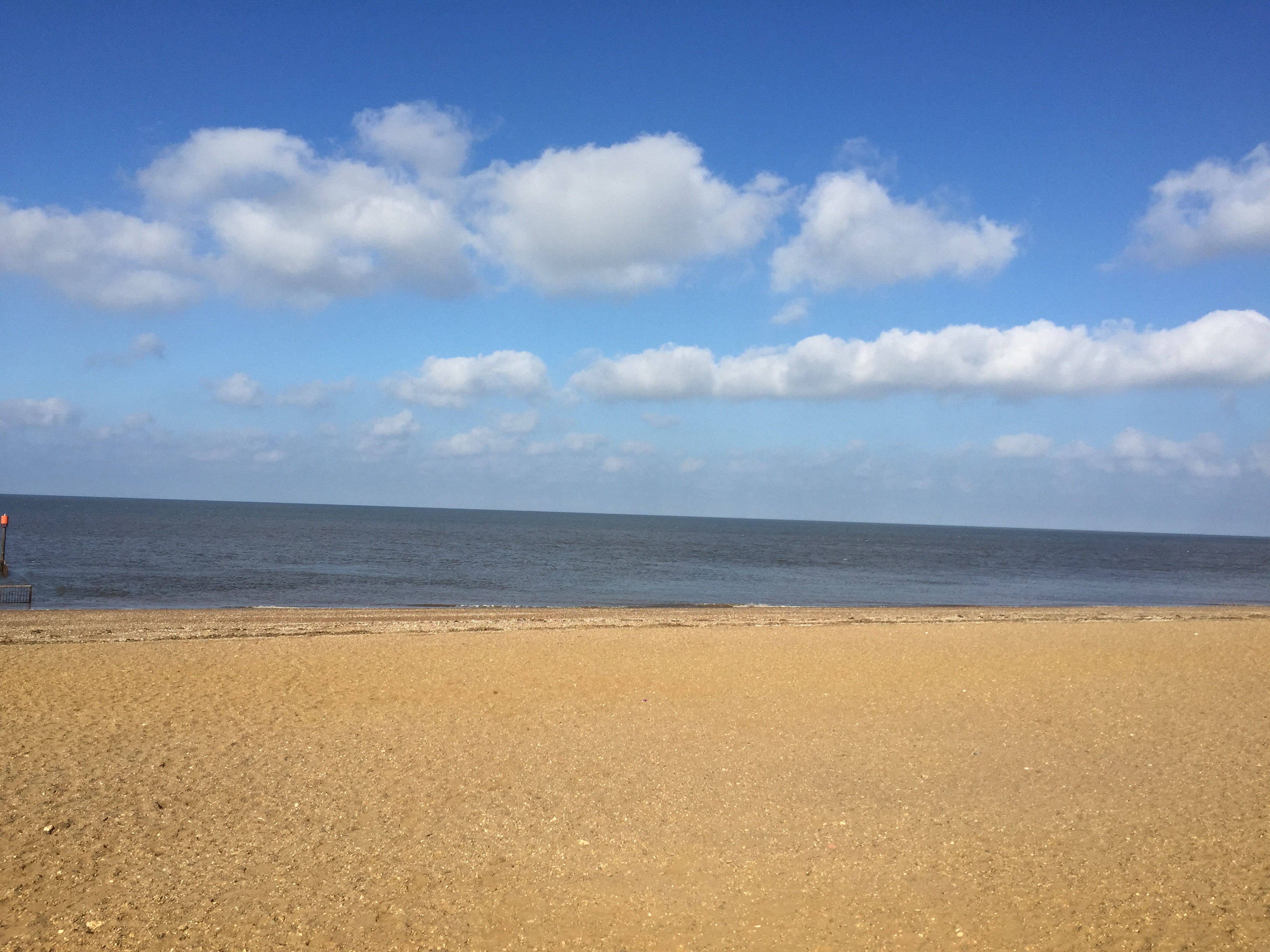 Hečemo pietinis paplūdimys